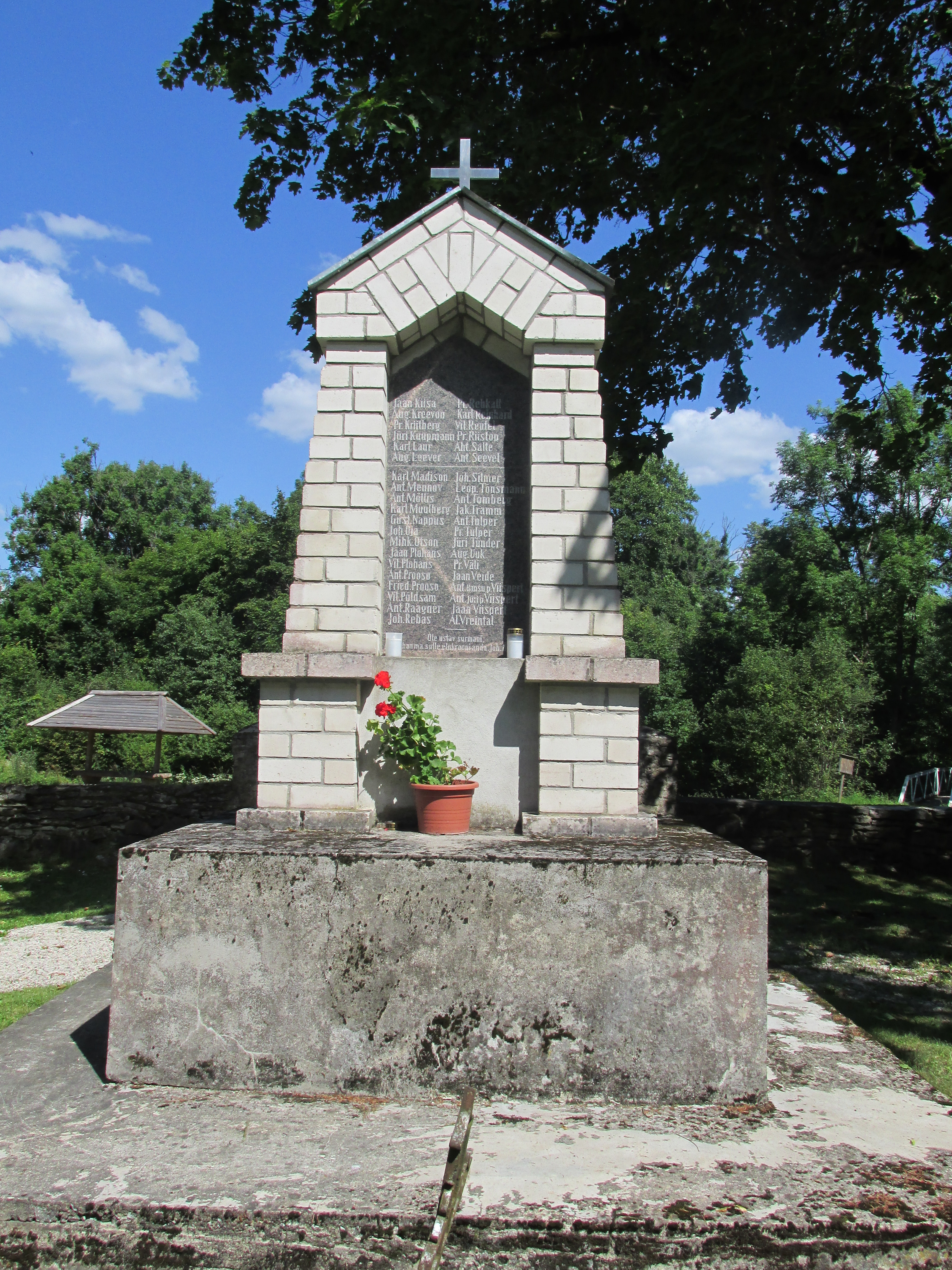 Vaade lõuna poolt